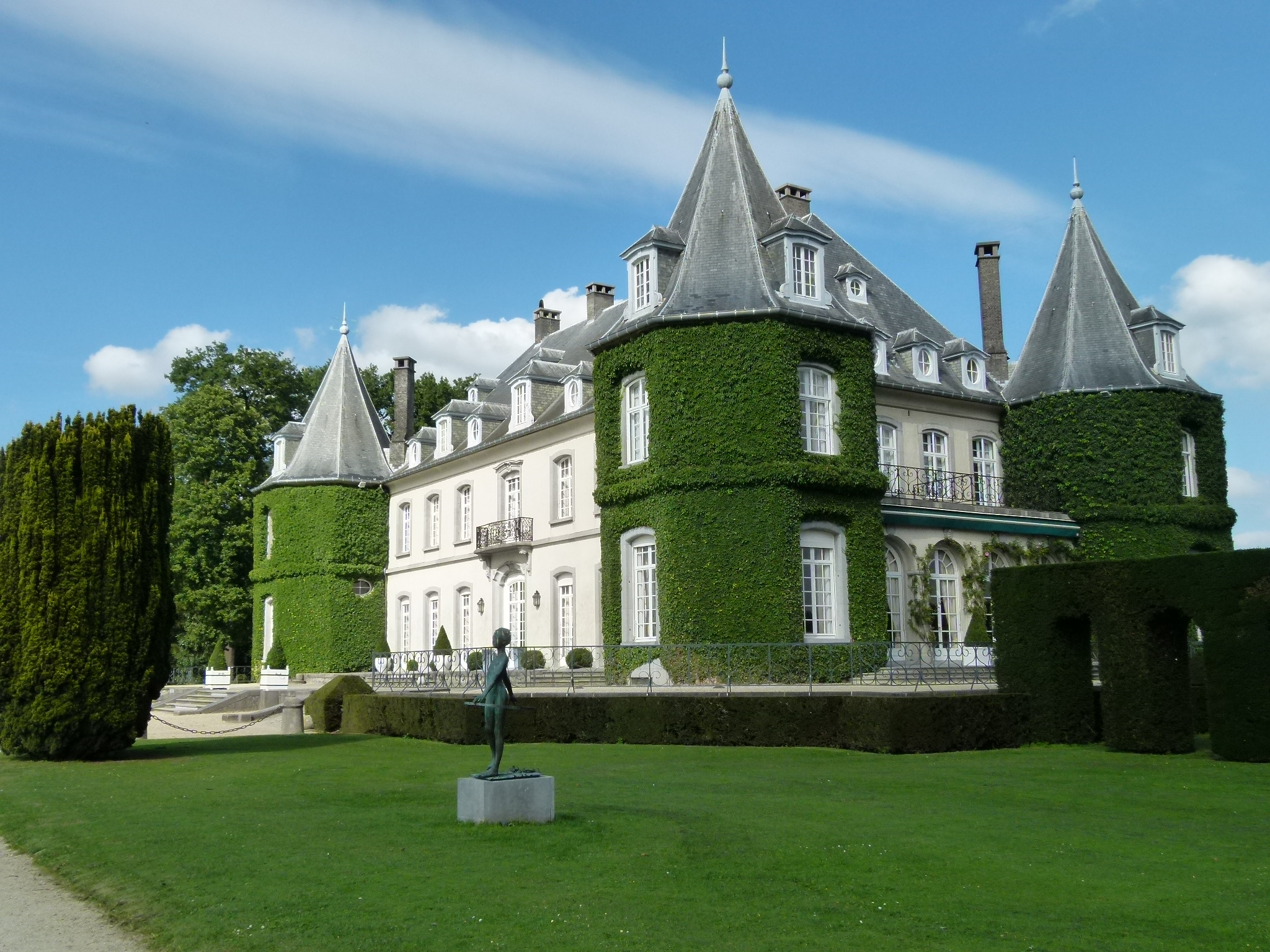 Kasteel van Ter Hulpen